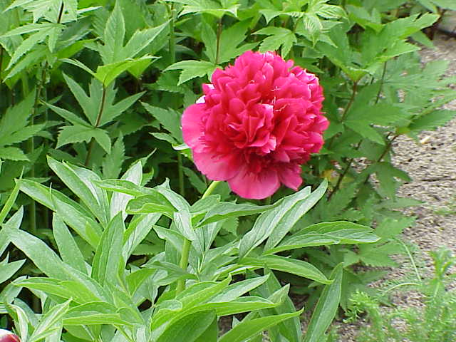 'Species: Paeonia × festiva 'Rubra Plena Family: Paeoniaceae Image No. 2